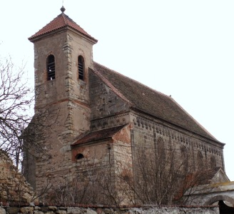 Kostel sv. Mikuláše v Potvorově.